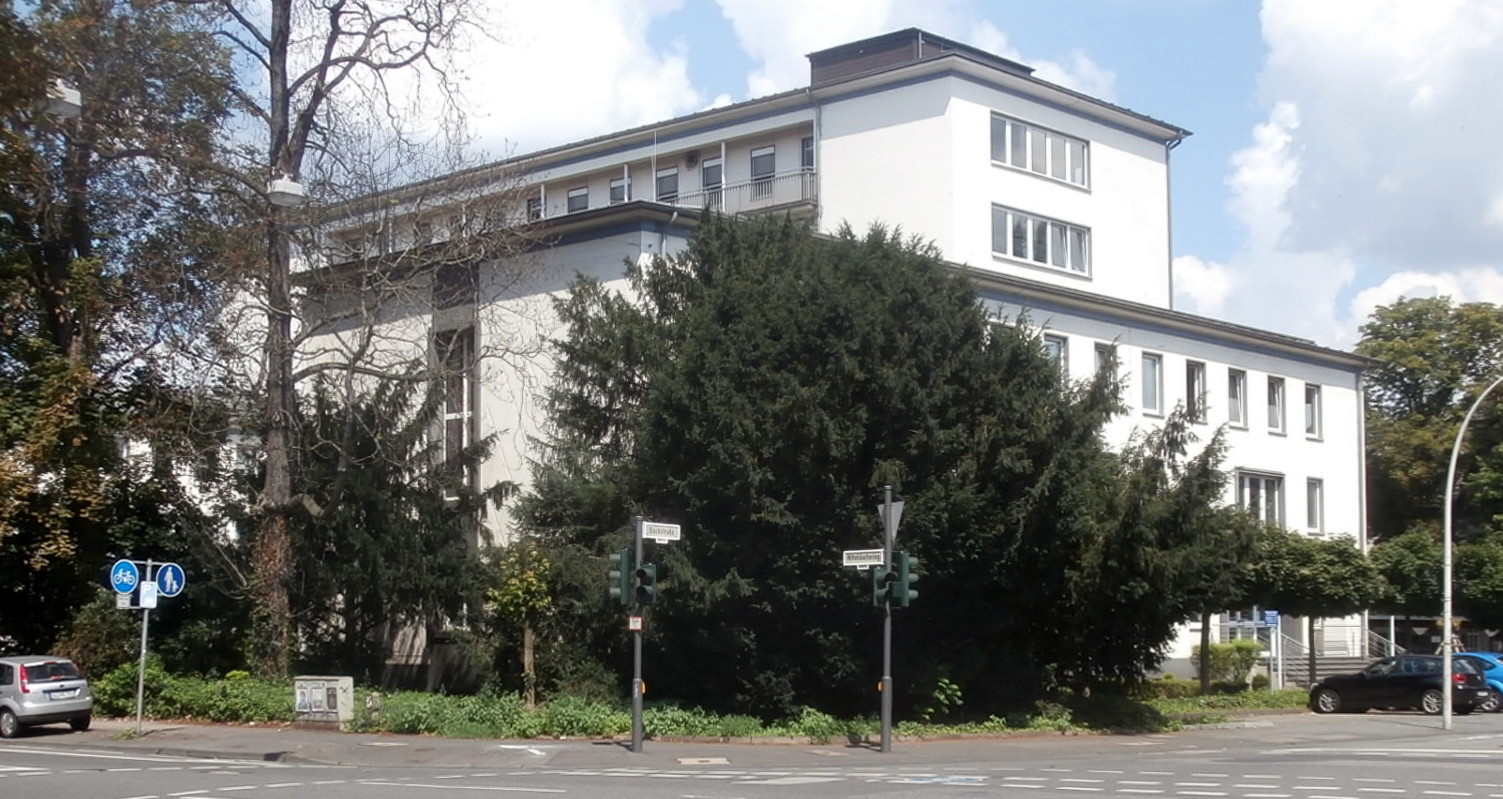 Ehemaliges Kreishaus, Bachstraße 36/Wittelsbacherring 16, Bonn-Weststadt